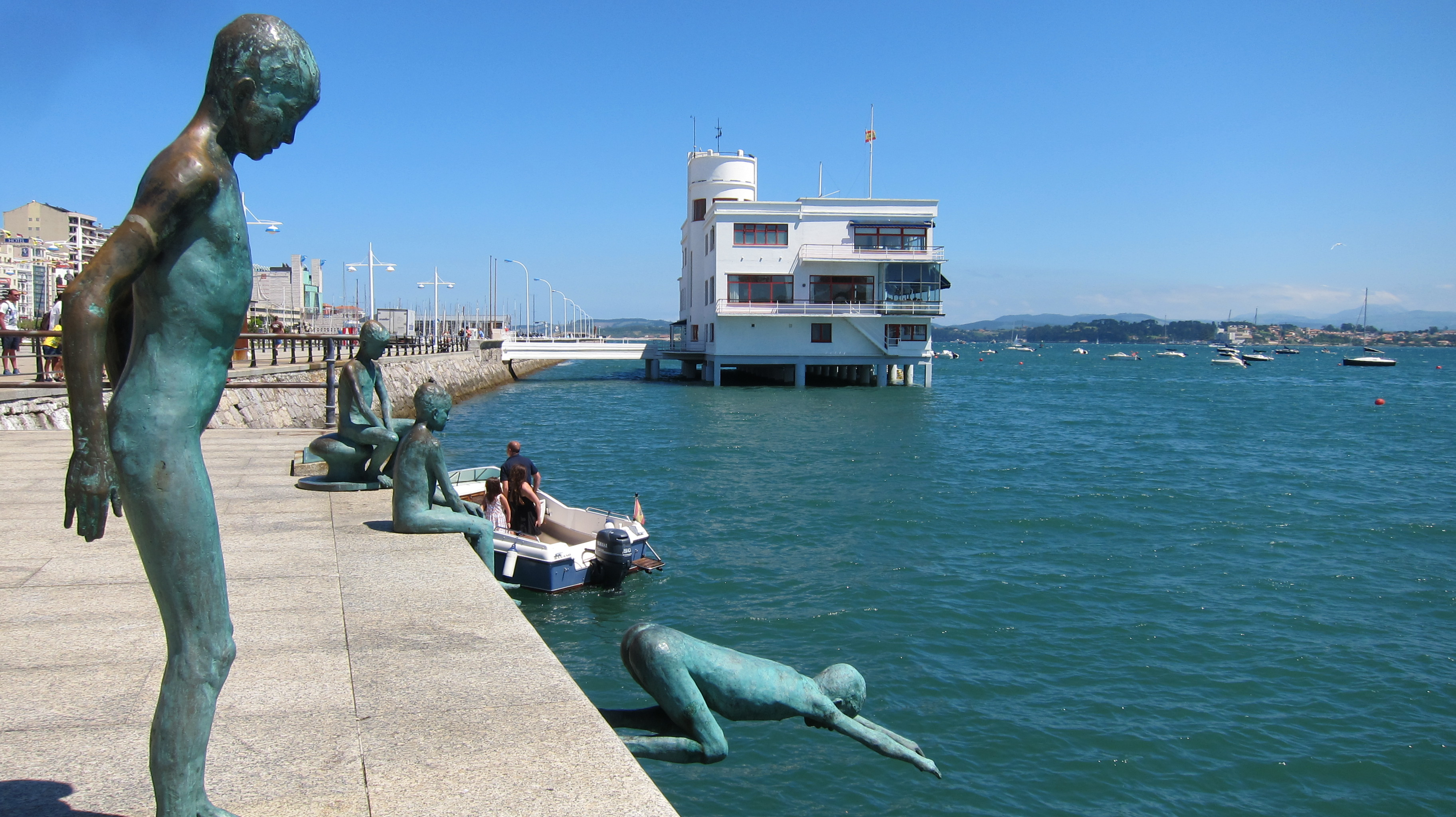 Santander